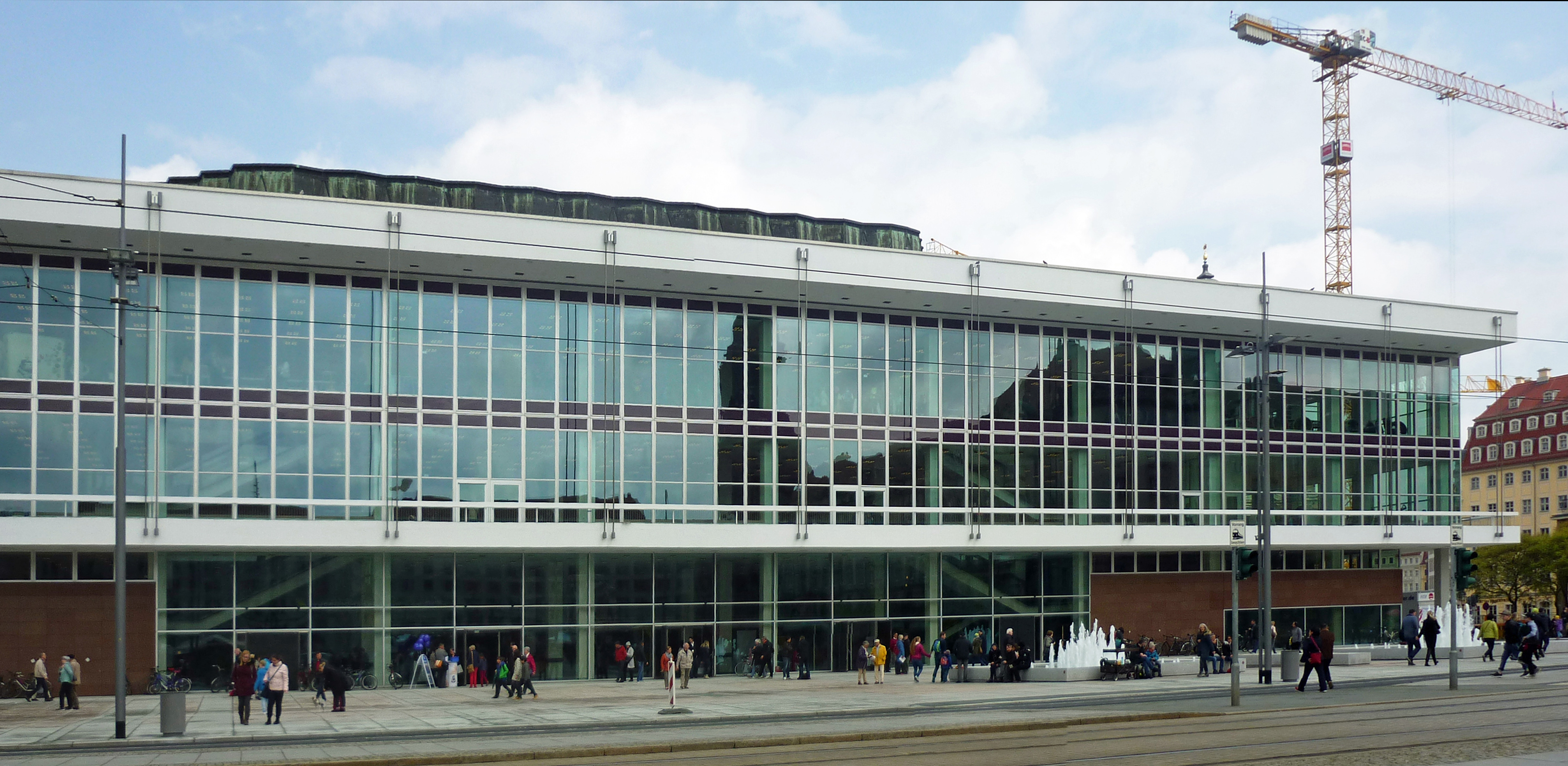 Kulturpalast Dresden nach der Wiedereröffnung am 28. April 2017